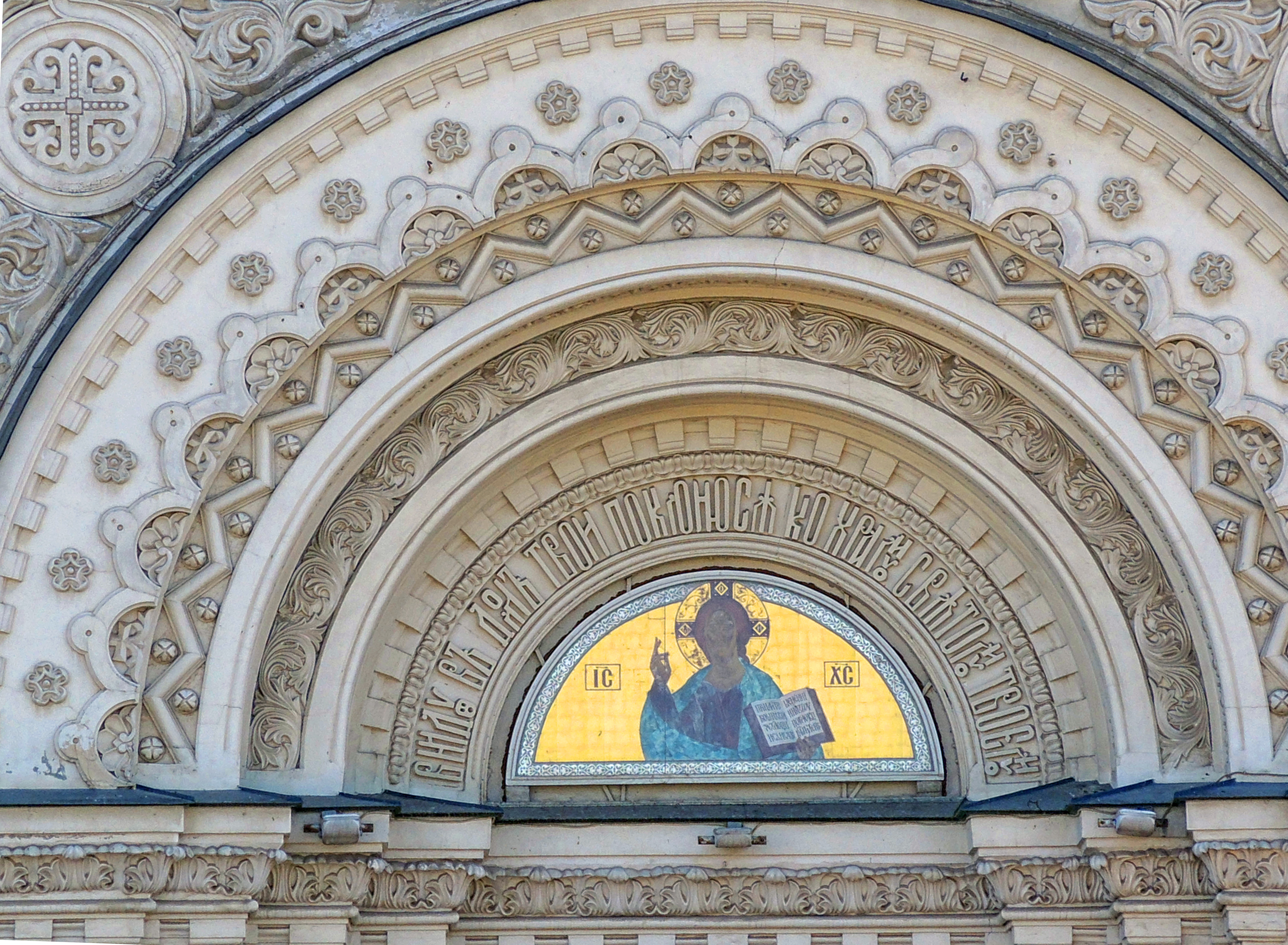 Войсковой Вознесенский собор - усыпальница Героев Отечественной войны 1812 года: площадь Ермака, 1, Новочеркасск, Ростовская область